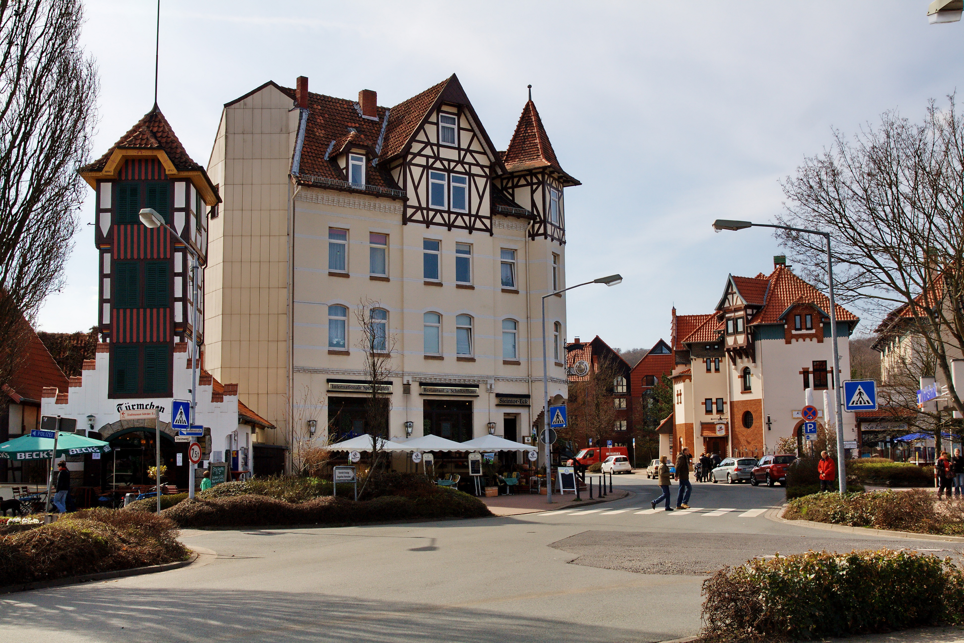 Ortsblick Gehrden, Niedersachsen, Deutschland